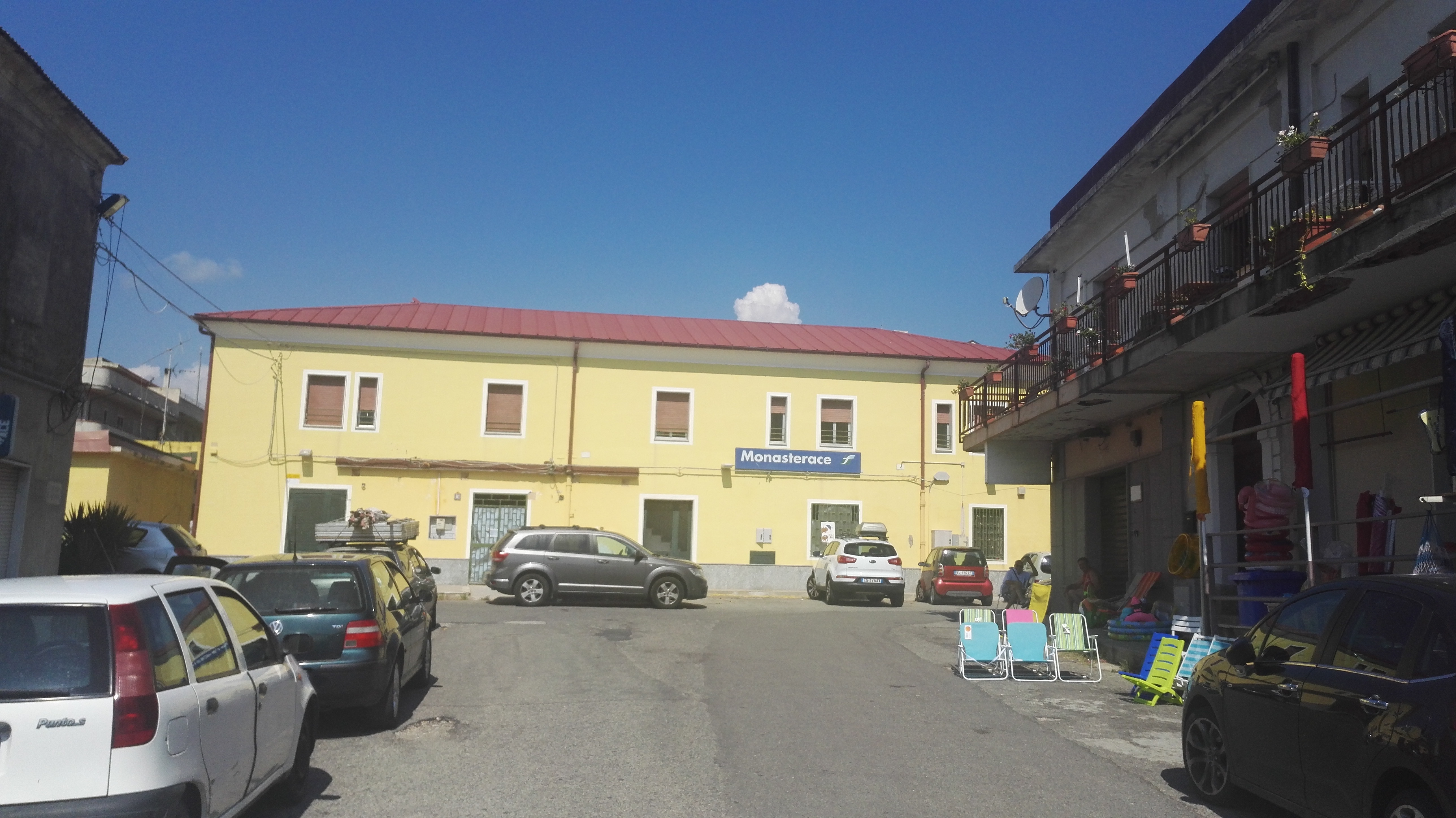 Stazione ferroviaria di Monasterace 2018